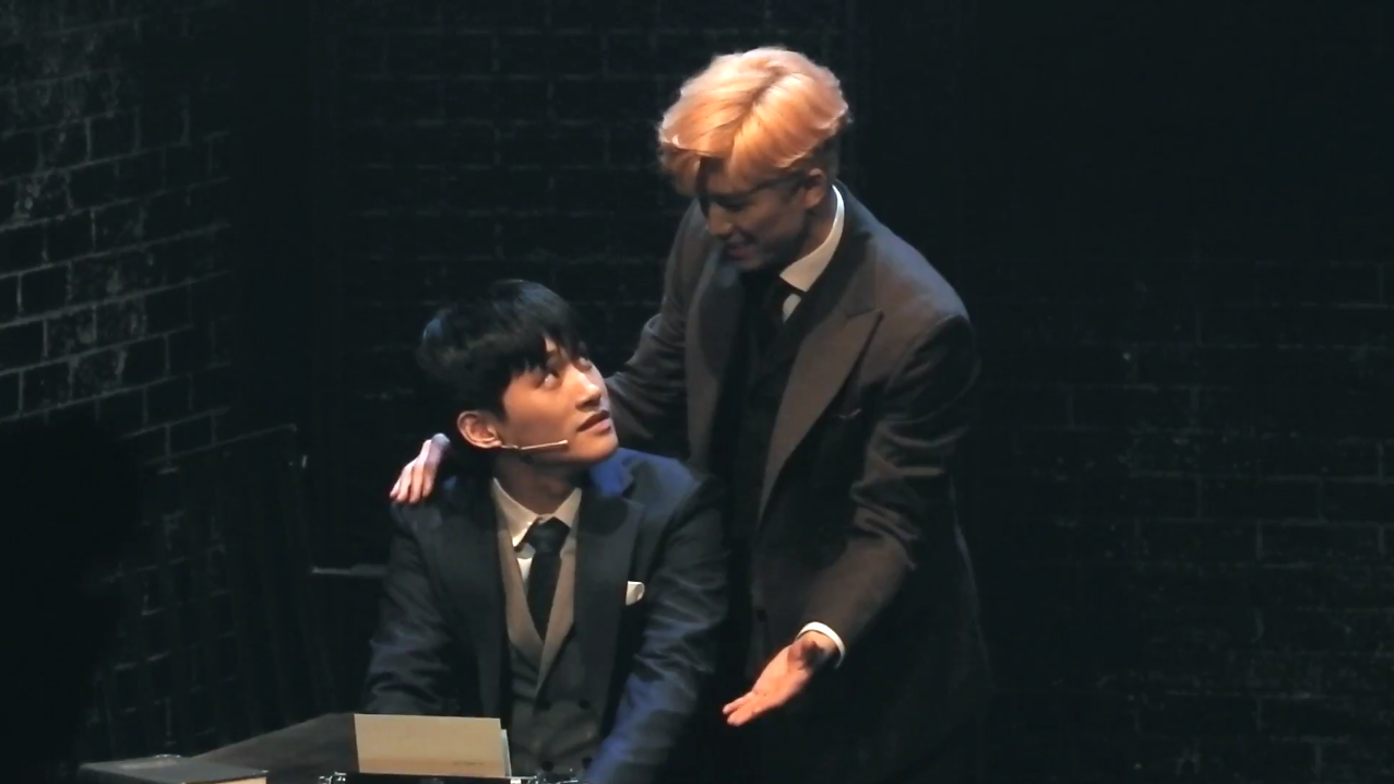 2017 쓰릴미 프레스콜 정욱진 정동화 A Written Contract (계약서) 0504